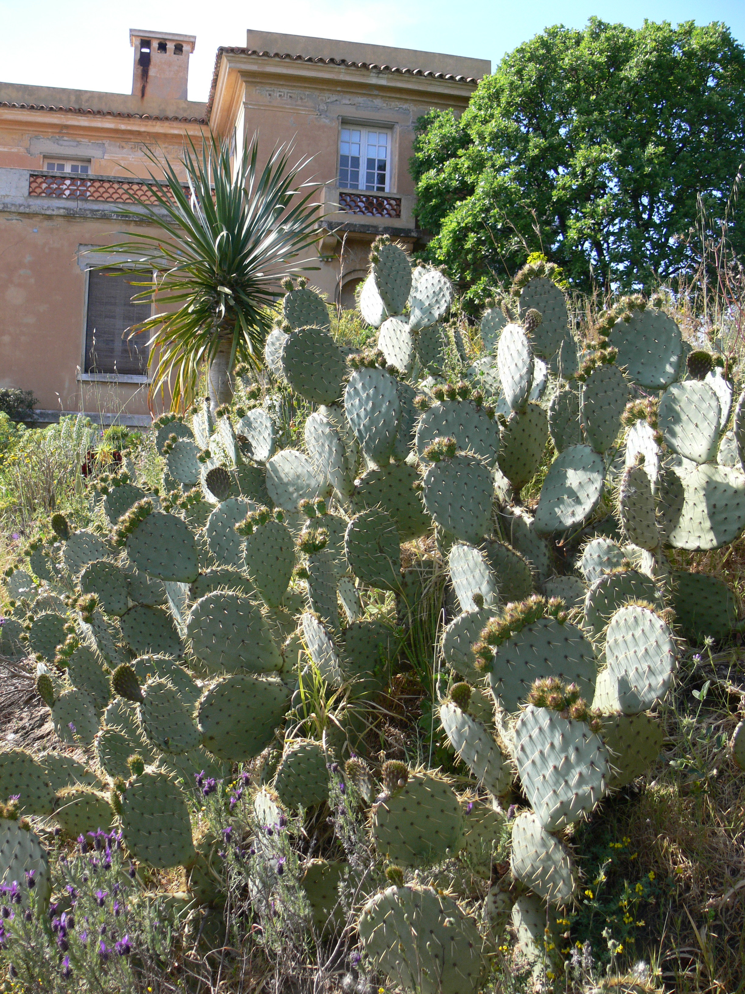 Domaine du Rayol, Var (France). Jardin botanique. Auteurs Jodelet / Lépinay